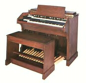 Fotografía de un Organo Hammond Modelo C3